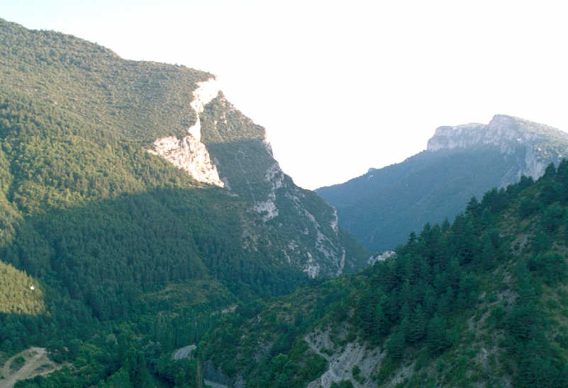 Foz de Burgui, entre las provincias de Navarra y Zaragoza, (España). Tomada por JMSE el 9 de julio de 2003 y cedida a Wikipedia. Categoría:España (imagen) Categoría:Fotografía (imagen)